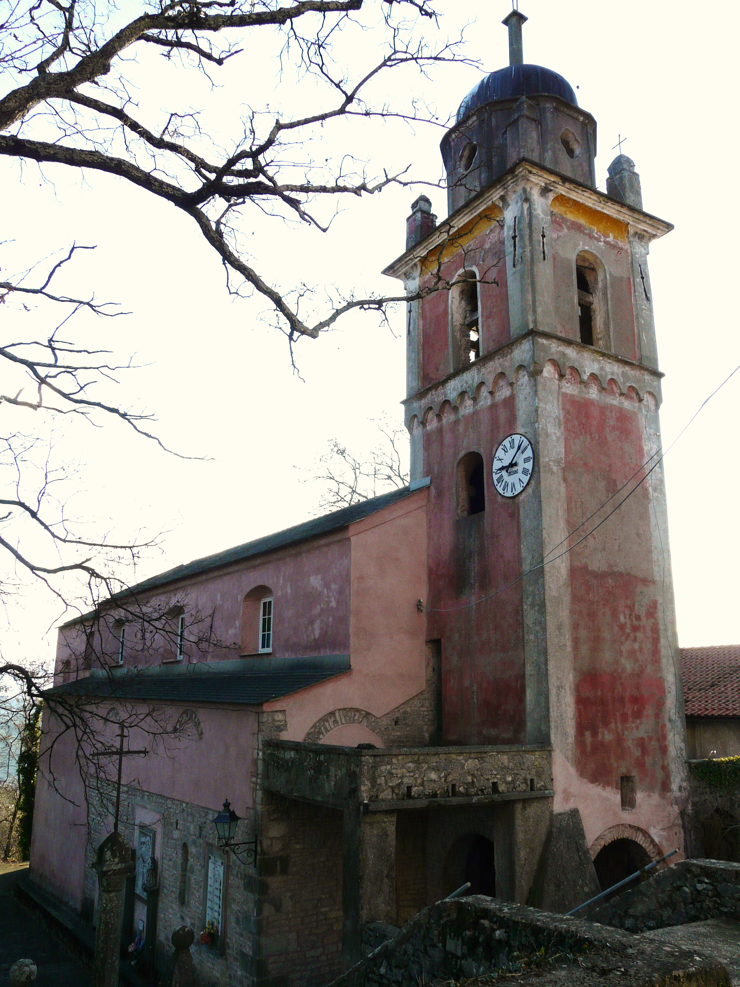 Chiesa di San Cristoforo, Ponzò, Riccò del Golfo di Spezia, Liguria, Italia